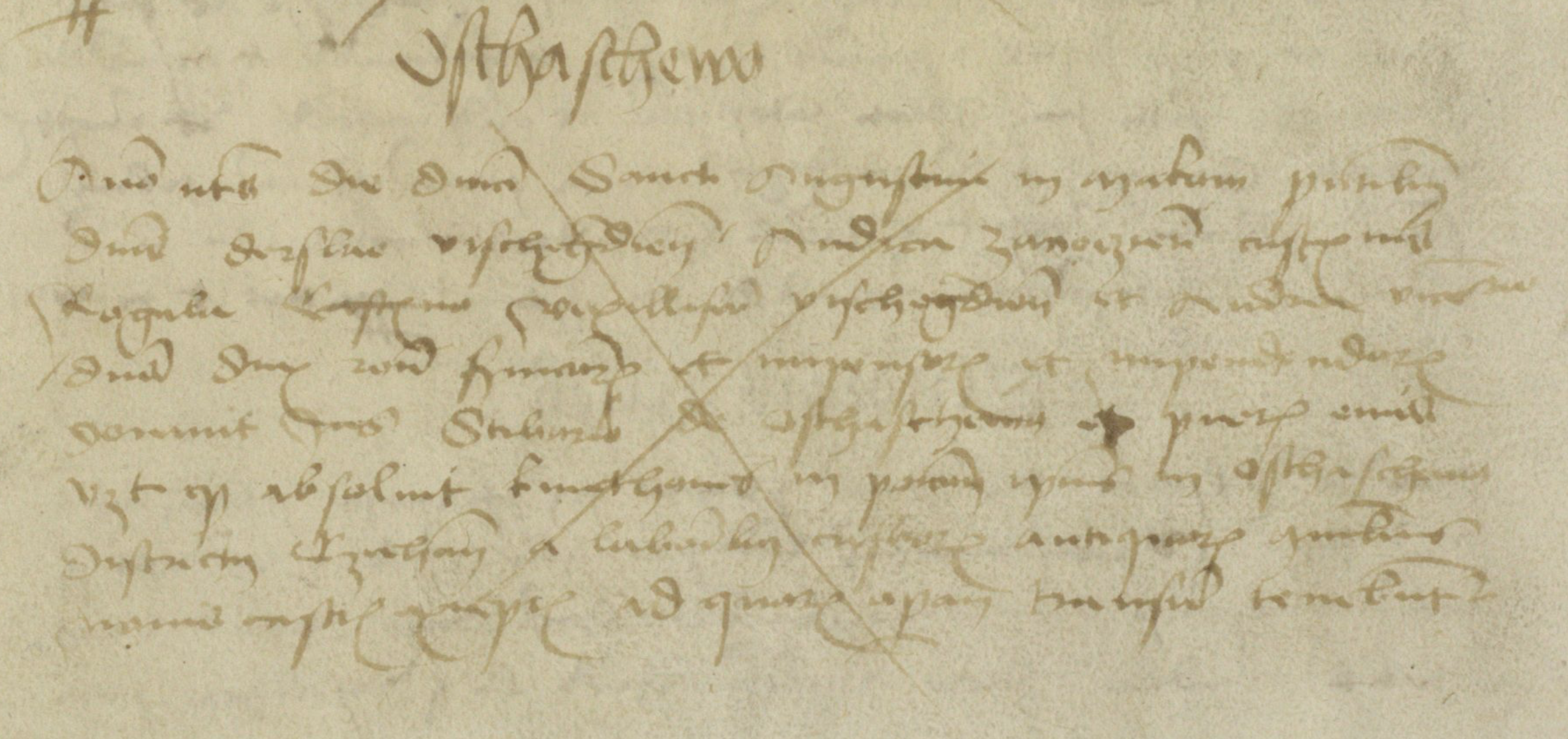 AGAD: Metryka Koronna, Księgi wpisów kancelarii mazowieckiej (Metryka Mazowiecka) MK 4, k. 32v. MK 4 (księga nr 4) to rejestr ks. Bolesława IV, skopiowany w drugiej połowie XV w.